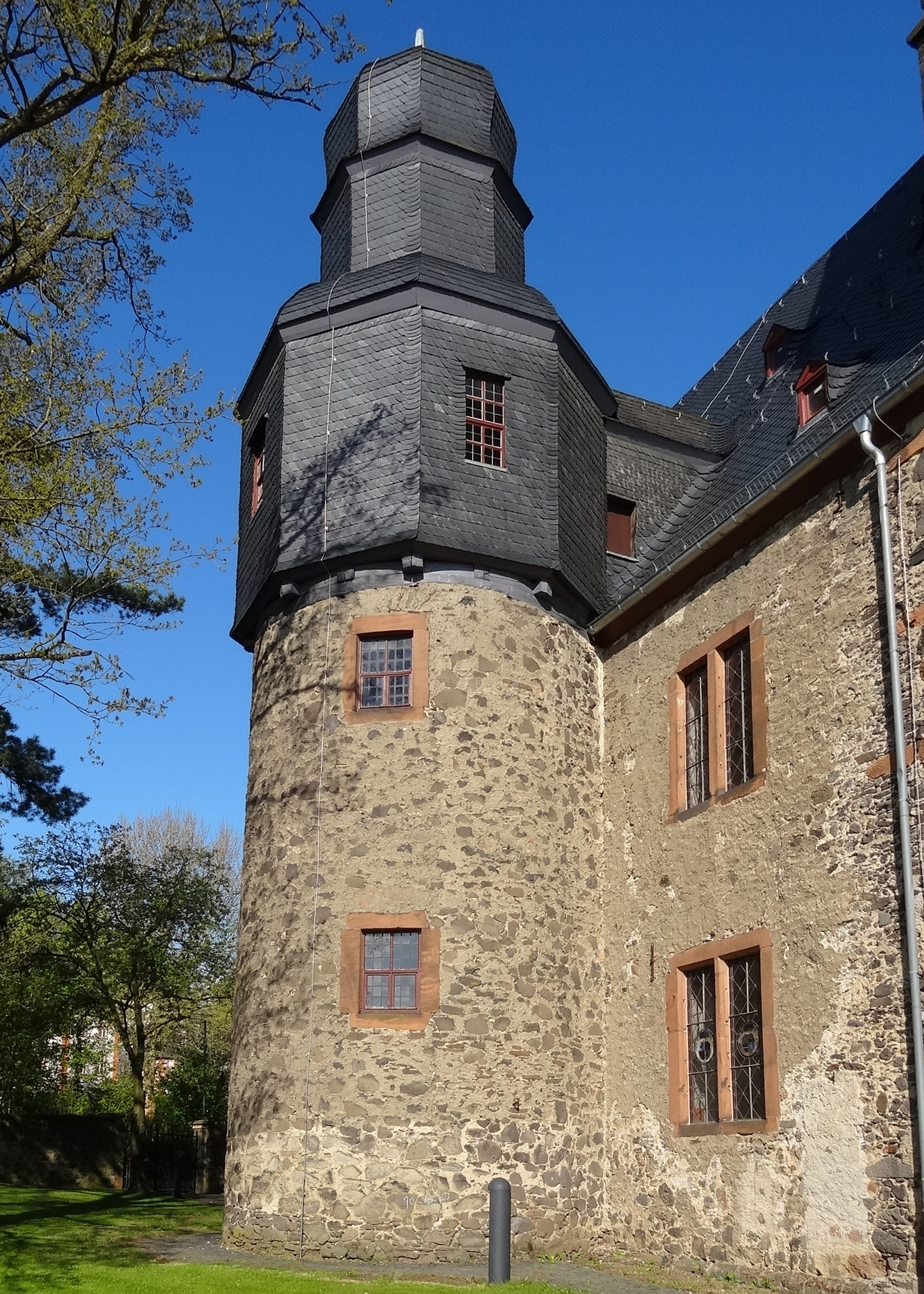 Evangelische Stadtkirche Hungen